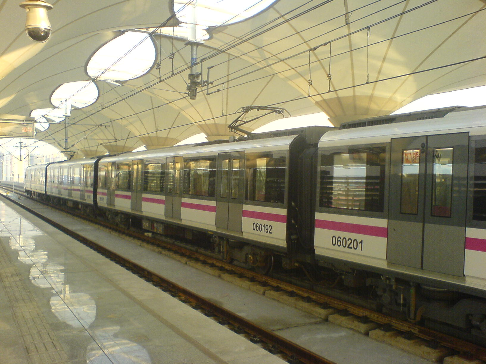 港城路站的六号线列车